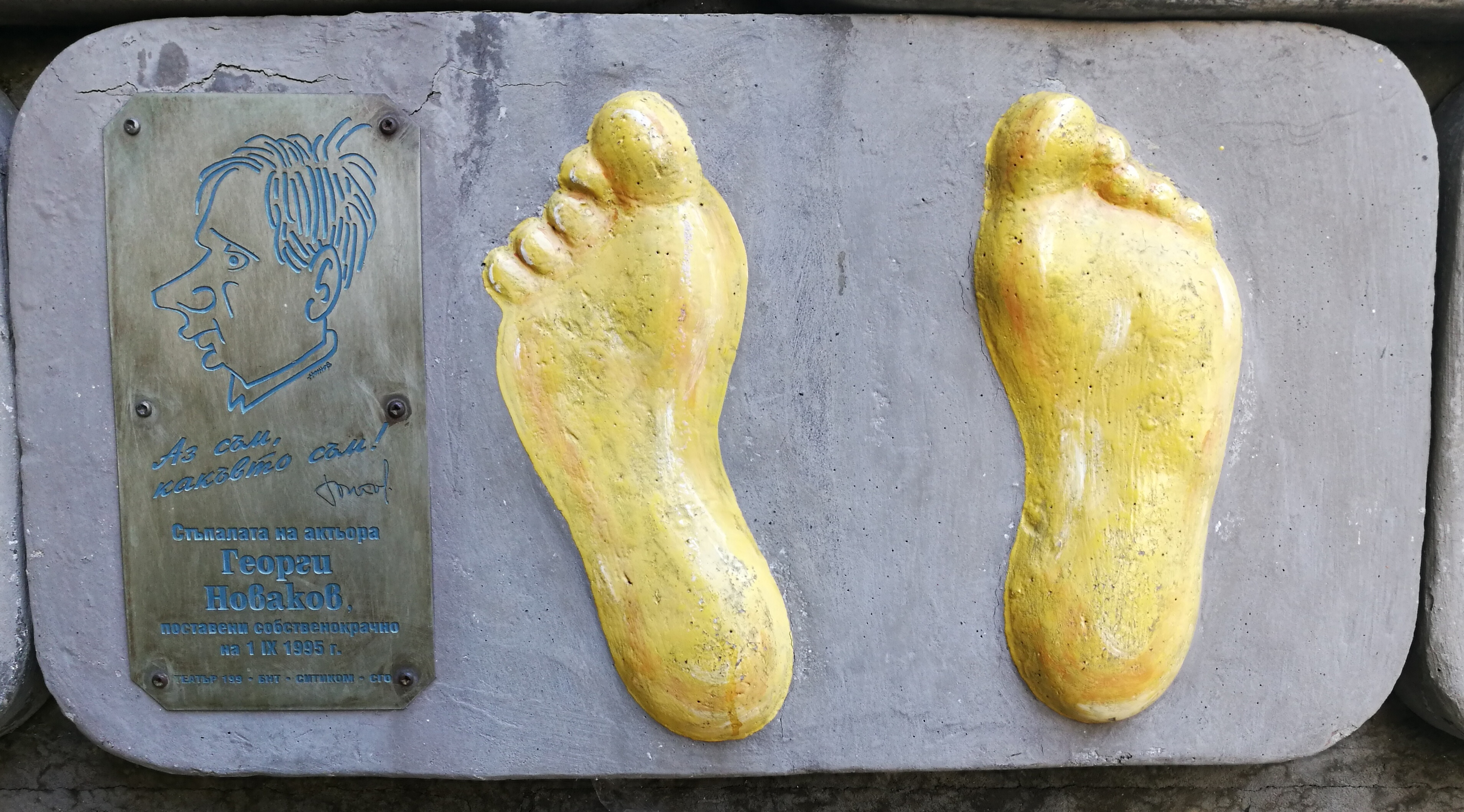 Стената на славата пред Театър 199 - пано с отпечатъци, послание и шарж на Георги Новаков.